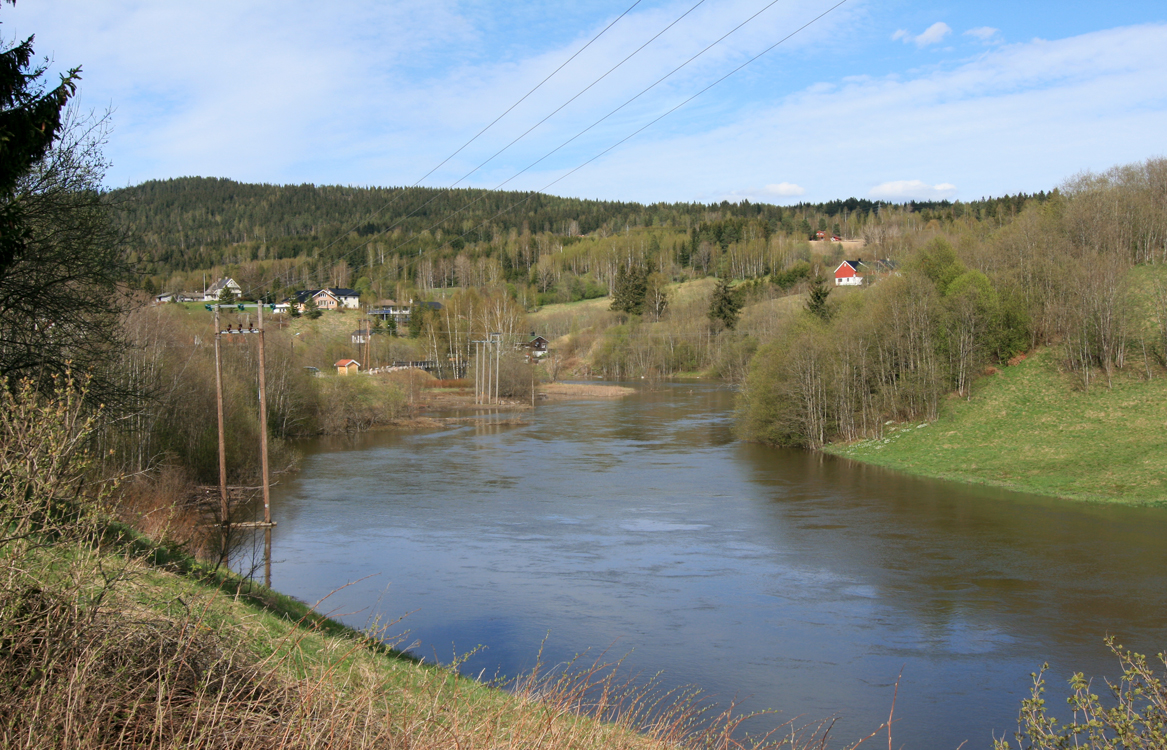 Nitelva gjennom Nittedal